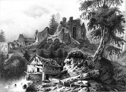 Ruines de la Chartreuse de Prémol (aujourd'hui Vaulnaveys-le-Haut).